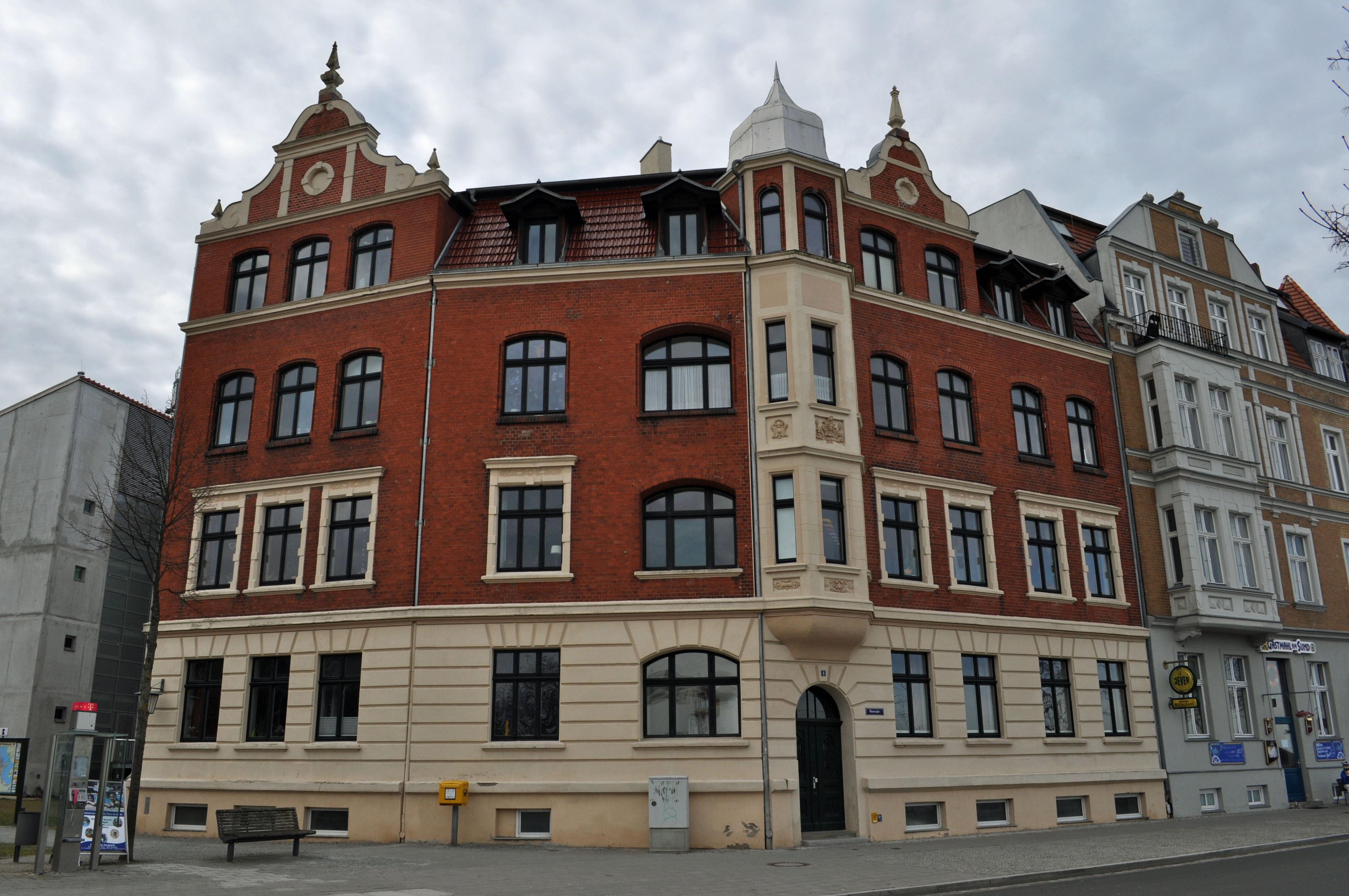 Gebäude bzw. Gebäudedetail in Stralsund. Straße und Hausnummer siehe Dateiname.